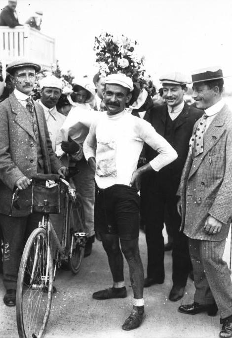 Tour de France, 30 juillet 1911, Garrigou 1er du classement